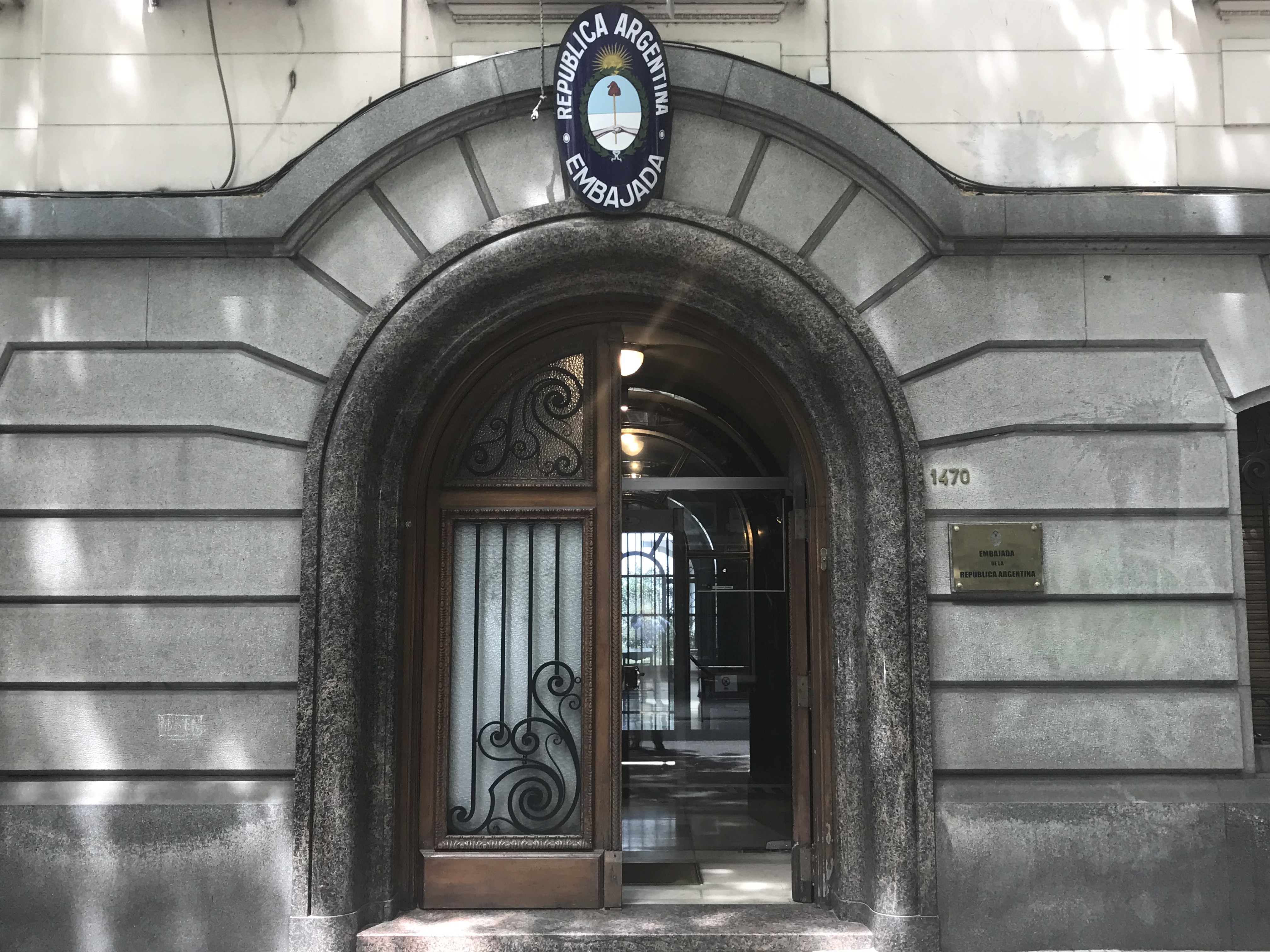 Fachada de la Embajada Argentina en Uruguay